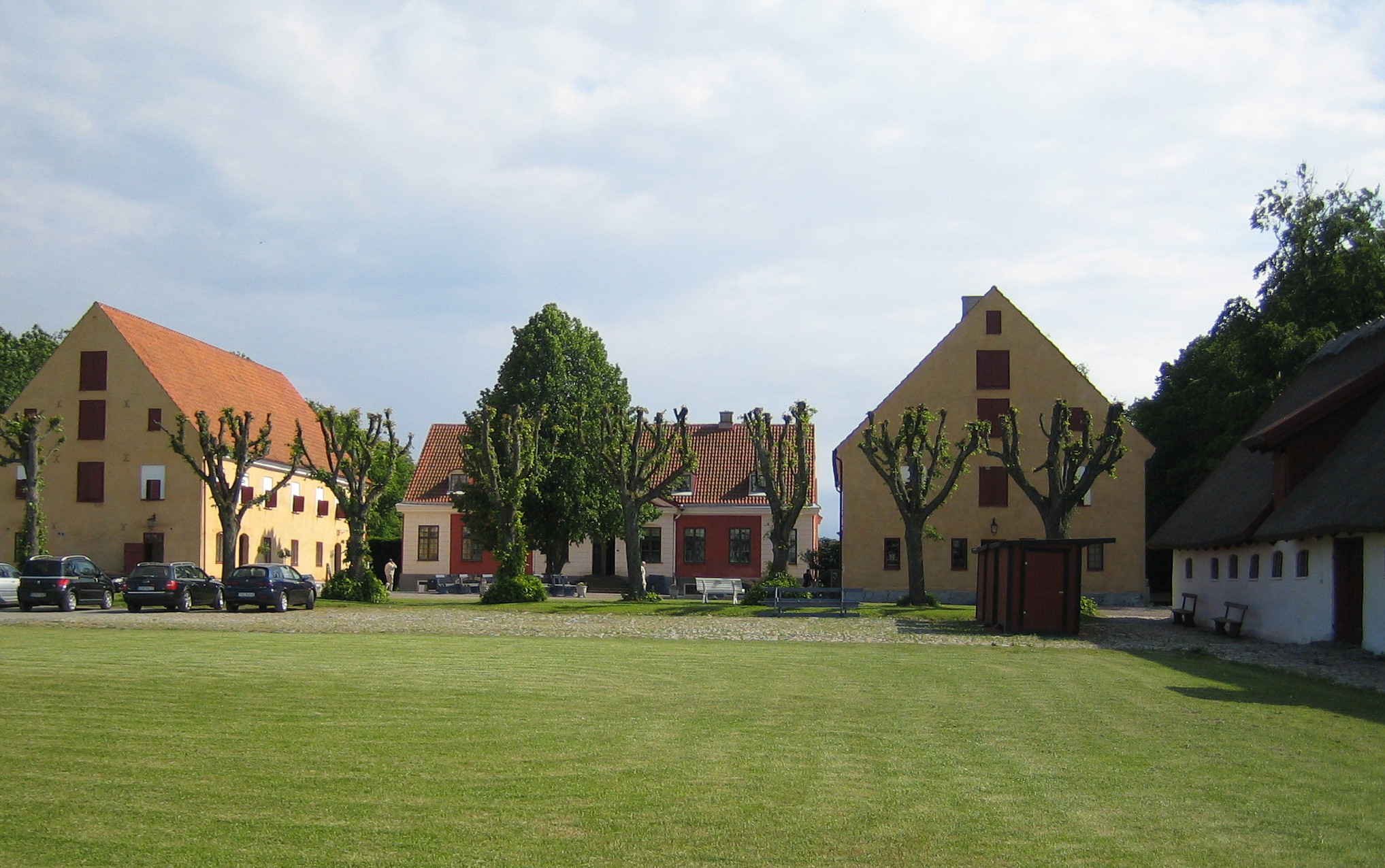 Katrinetorp Manor in Malmö, Sweden.